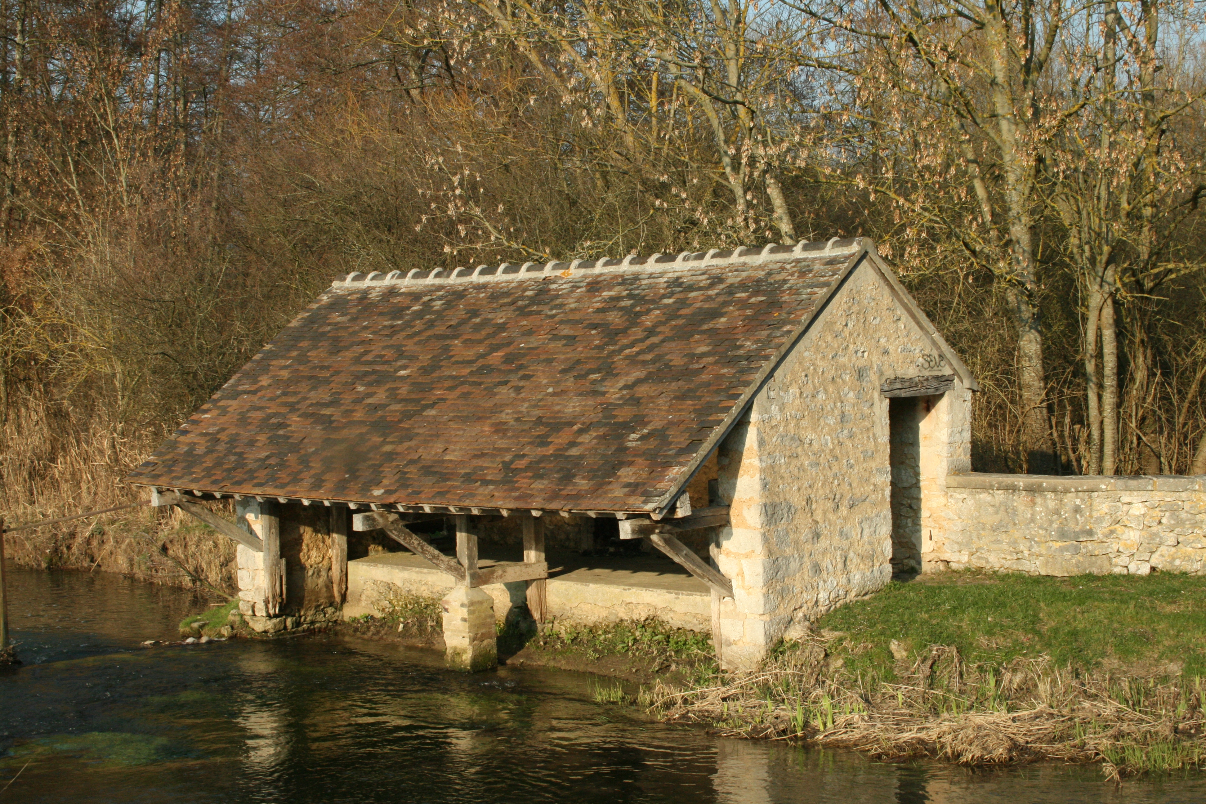 À la différence de beaucoup d'autres, ce lavoir (XIXe siècle) est entouré de murs, que vient percer une porte d'accès sur l'un des côtés. Ces murs constituent en premier lieu une protection contre le vent mais ont également une fonction esthétique. Le linge était autrefois mis à sécher sur les berges avoisinantes ou sur les poutres de l'auvent. Source : Le Patrimoine des communes de la Seine-et-Marne. Île de France. Éditions Flohic.